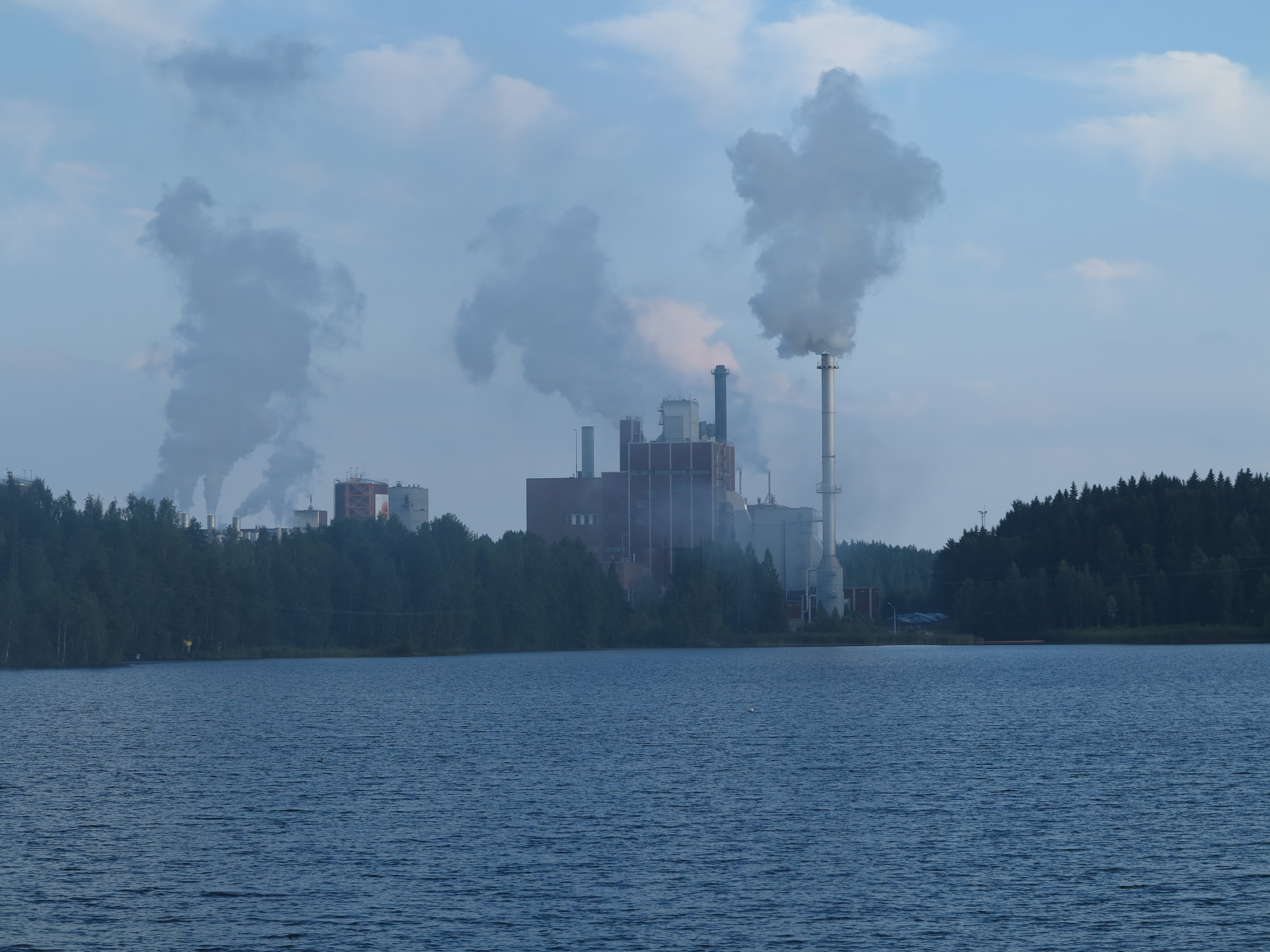 Stora Enson Heinolan flutingtehdas